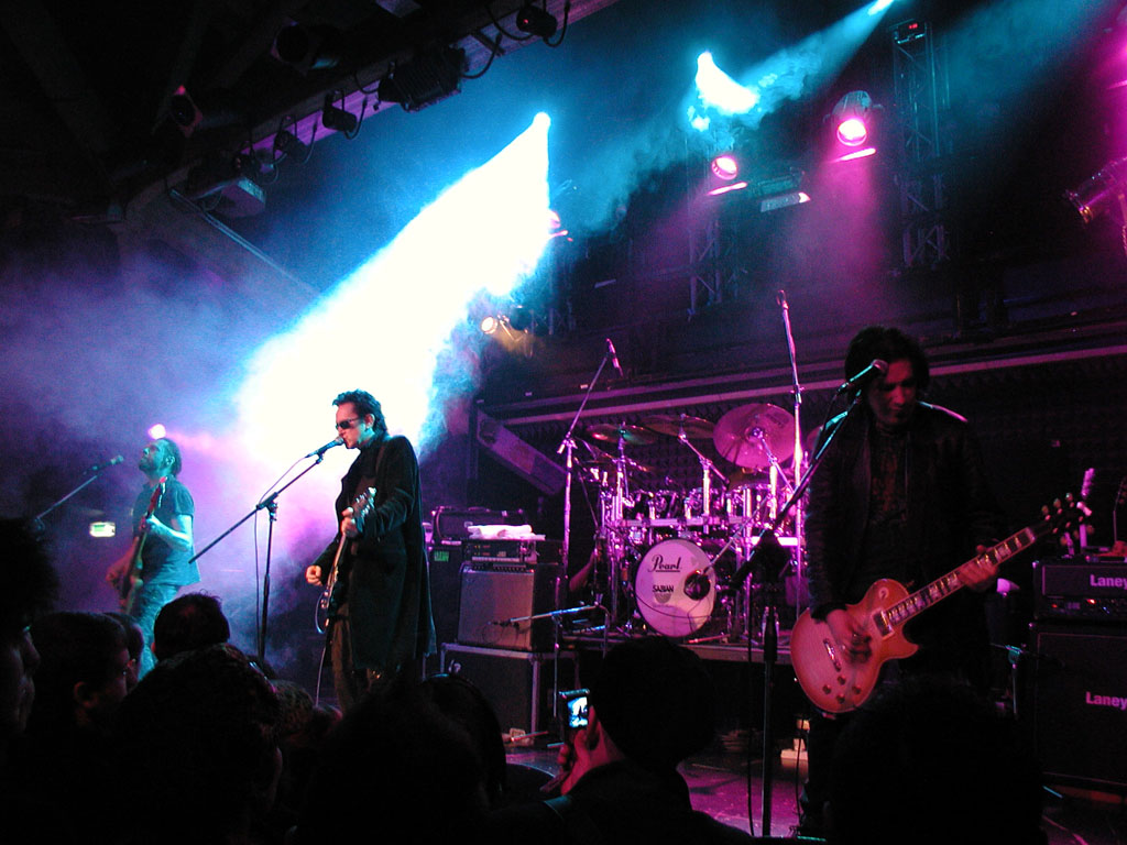 the mission на концерте